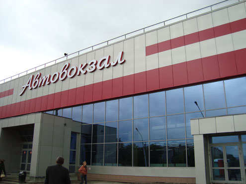 Автовокзал наши дни